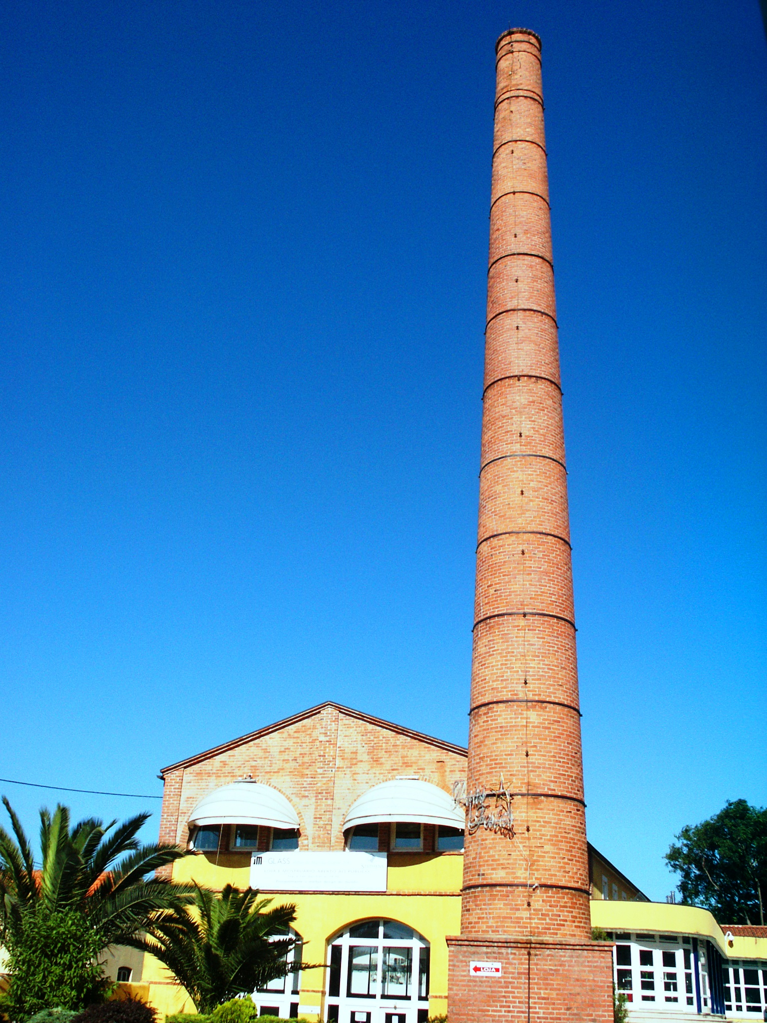 Aqui se fabricaram os mais belos cristais de Portugal - quiçá do mundo. Hoje apenas memória.